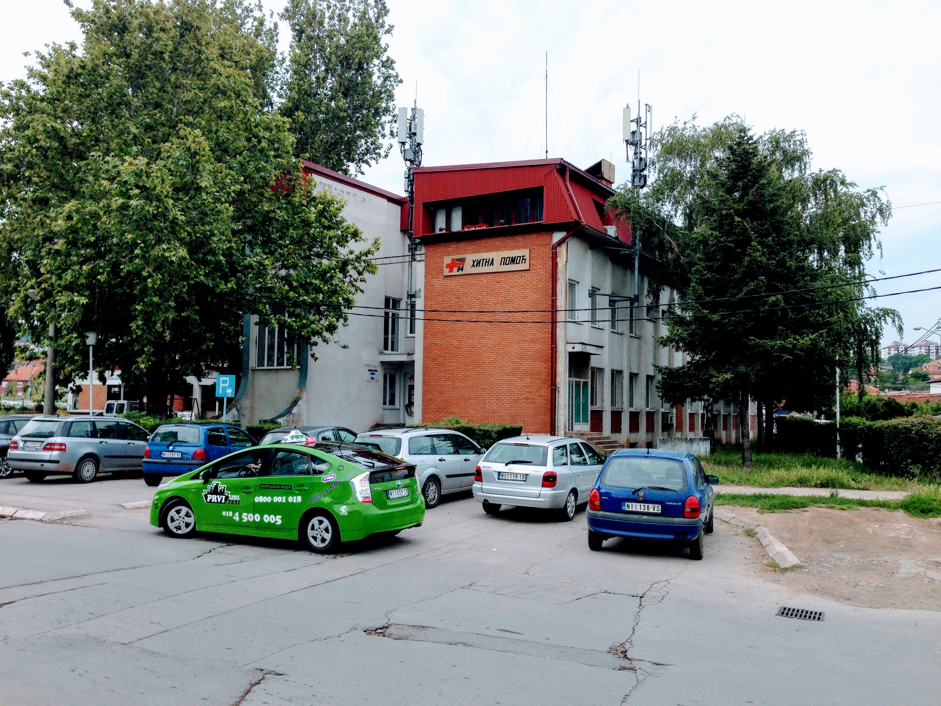 Srpski (latinica): Завод за хитну медицинску помоћ Ниш